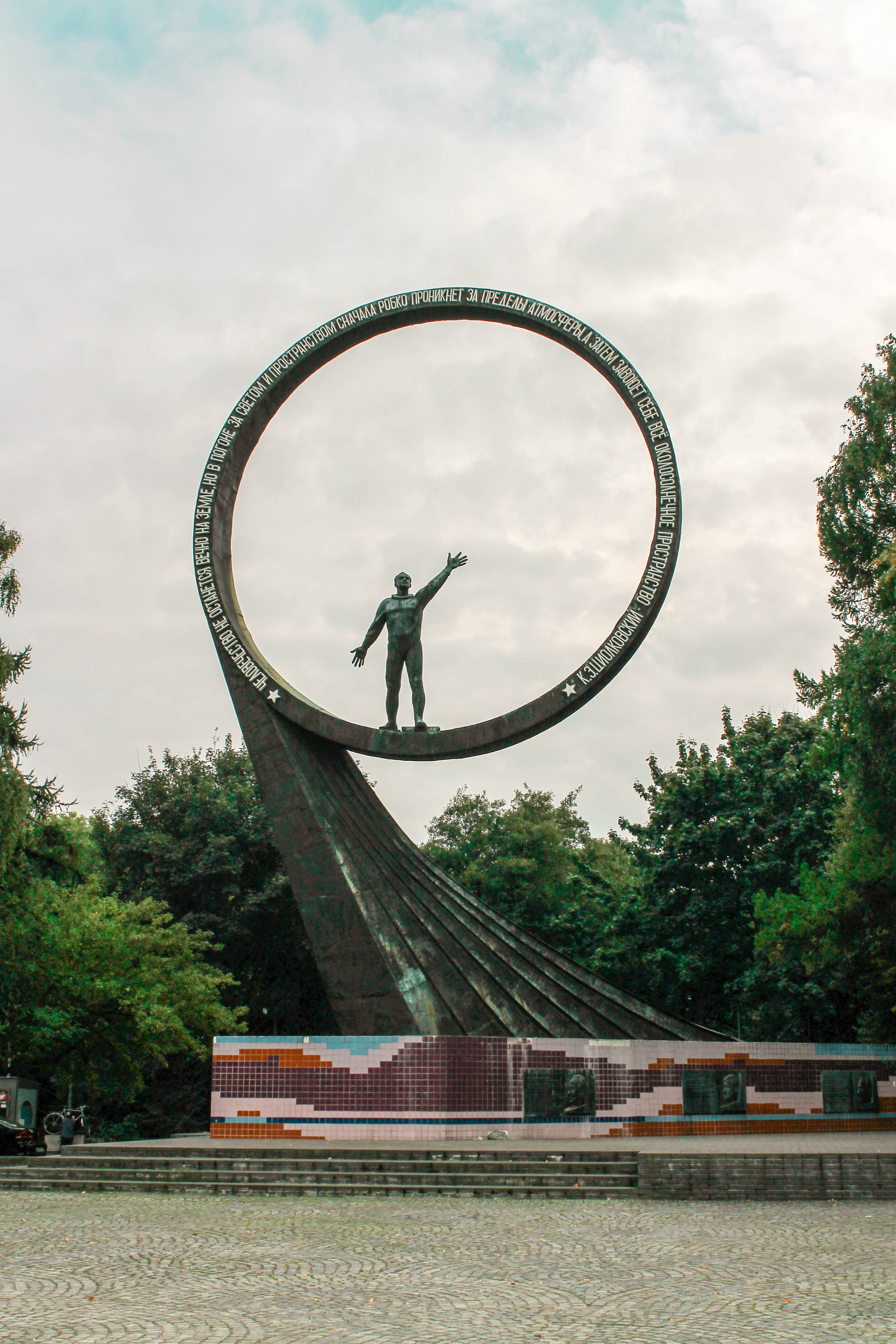 Памятный знак землякам-космонавтам: проспект Мира, около к/т "Заря", Калининград, Калининградская область